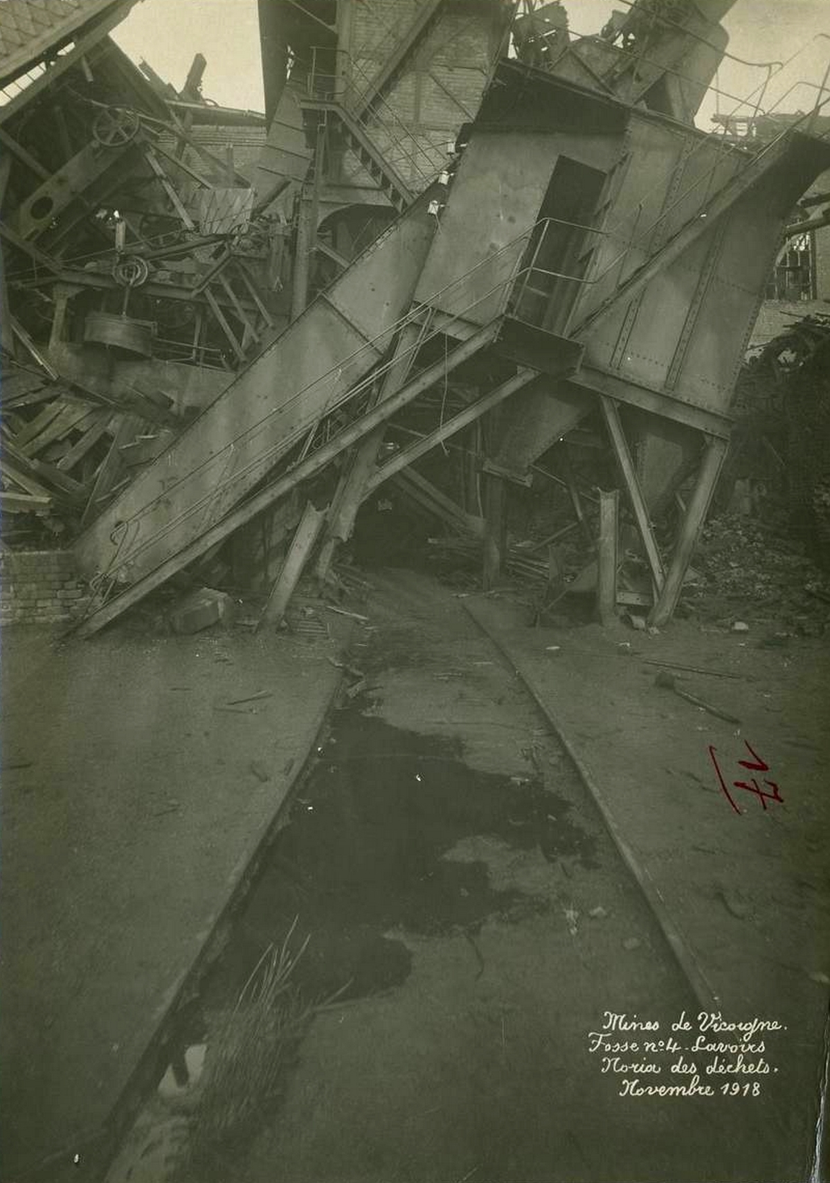 La Fosse n° 4 ou Le Bret de la Compagnie des mines de Vicoigne était un charbonnage constitué d'un seul puits situé à Raismes, Nord, Nord-Pas-de-Calais, France. L'image représente les lavoirs, après la Première Guerre mondiale.